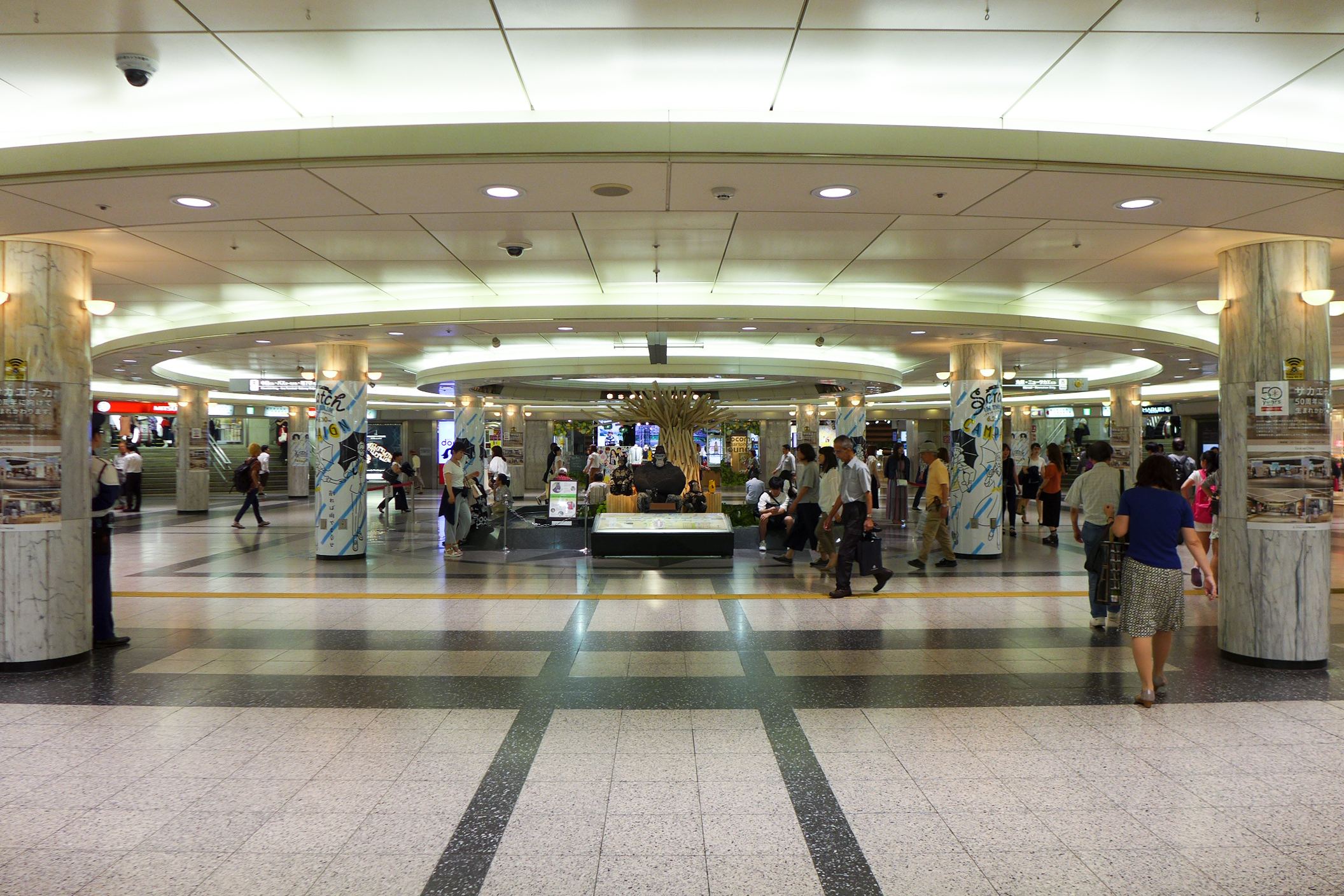 SakaeChika